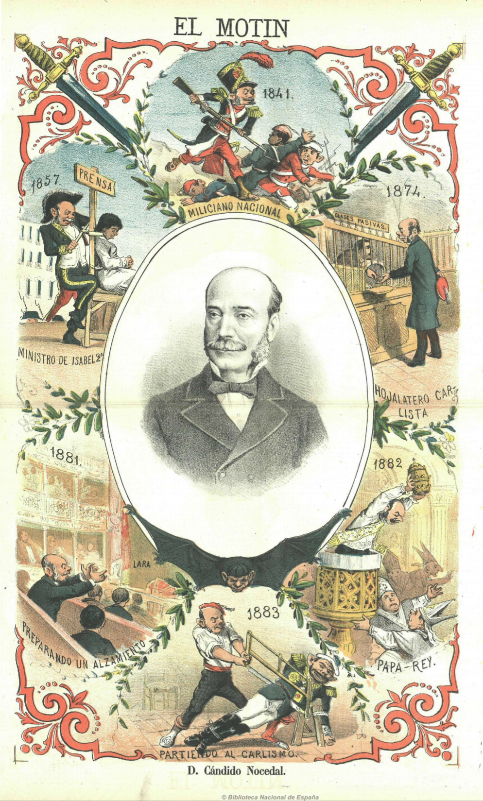 Caricatura de Cándido Nocedal en El Motín